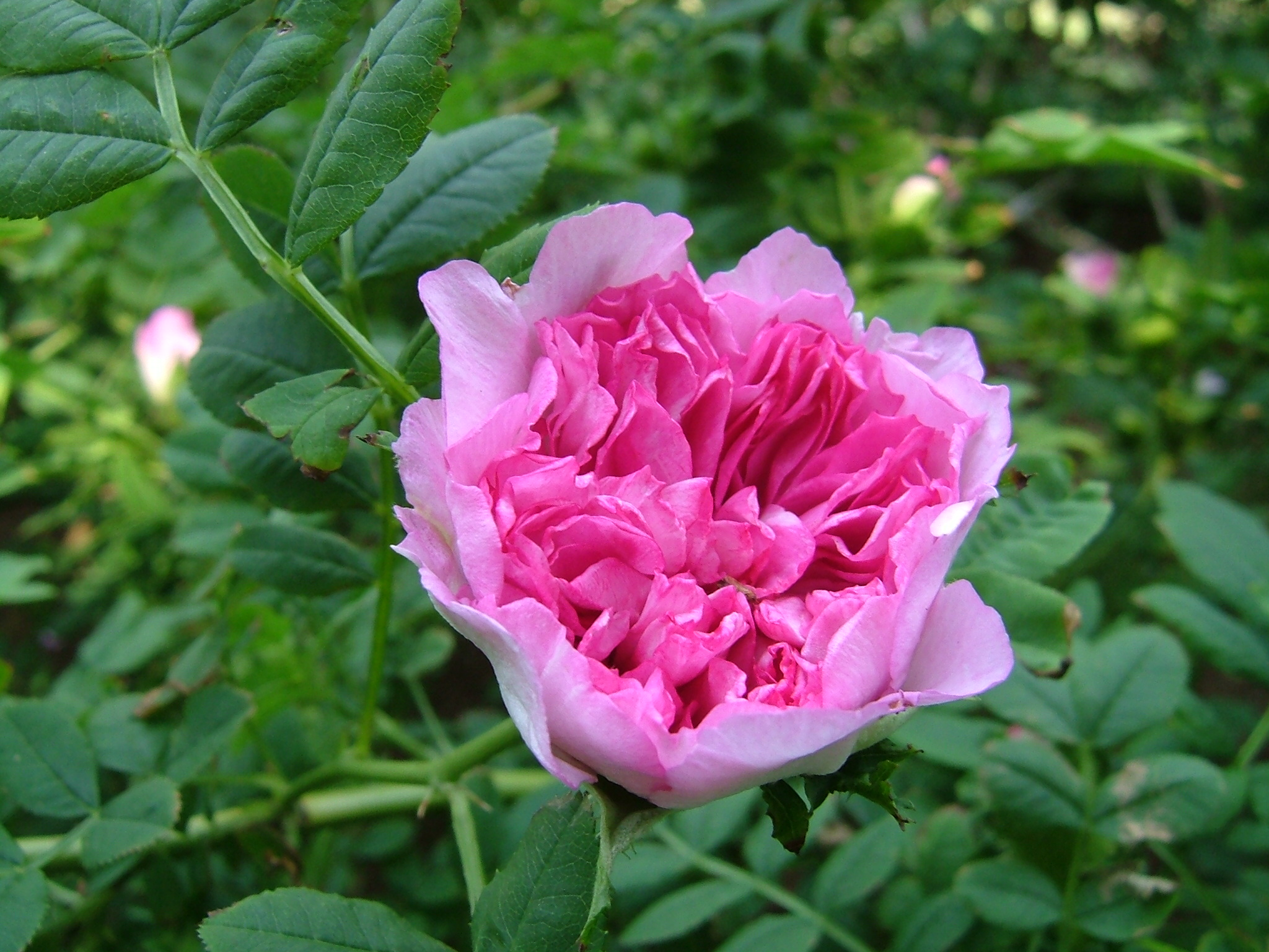 ロサ ロクスブルギー（イザヨイバラ）Rosa roxburghii